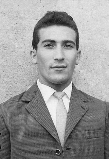 Lorenzo Calafiore